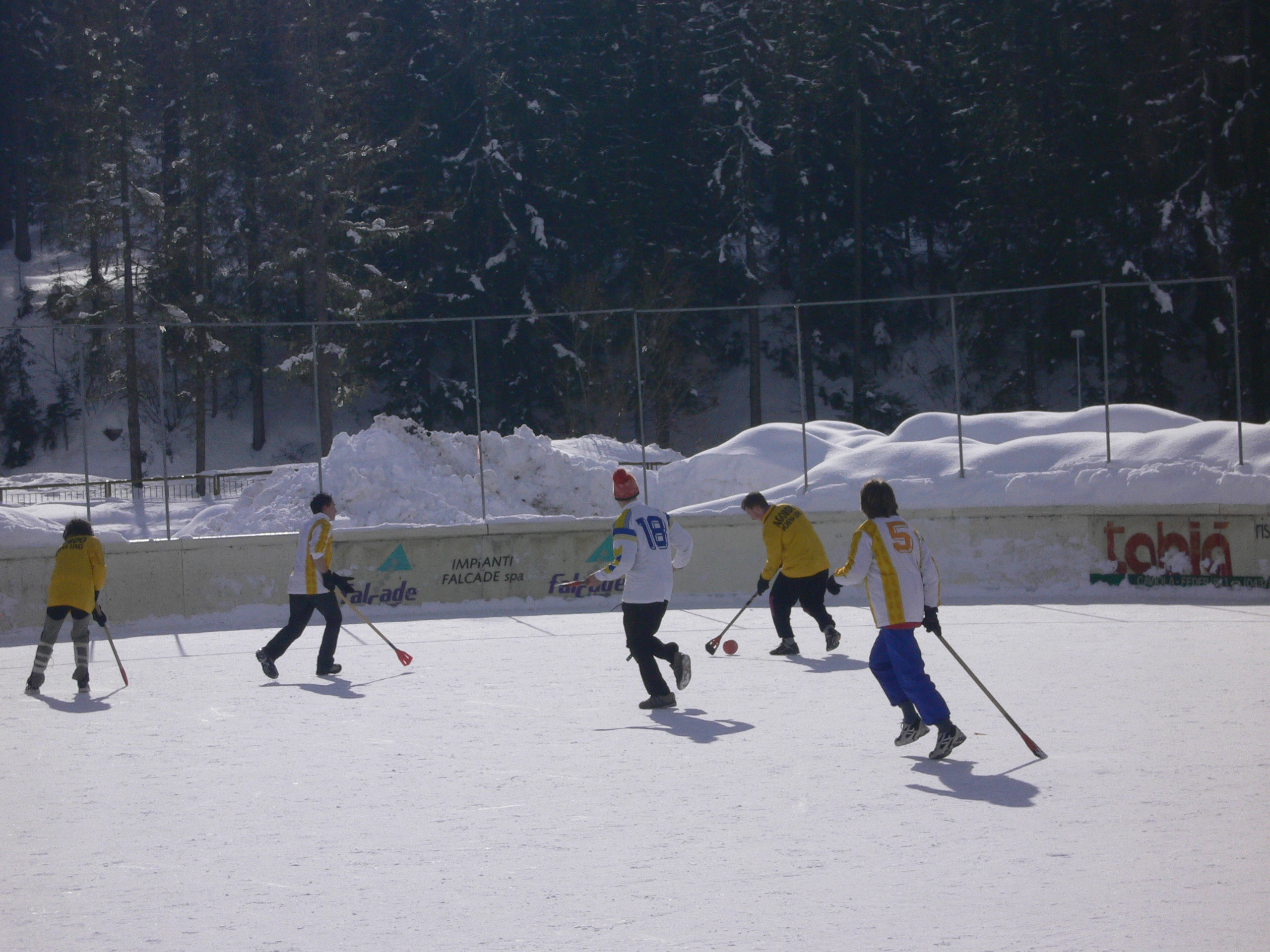 Partita amatoriale di Broomball. Falcade(BL) Gennaio 2006. Foto di Geremetta Moreno